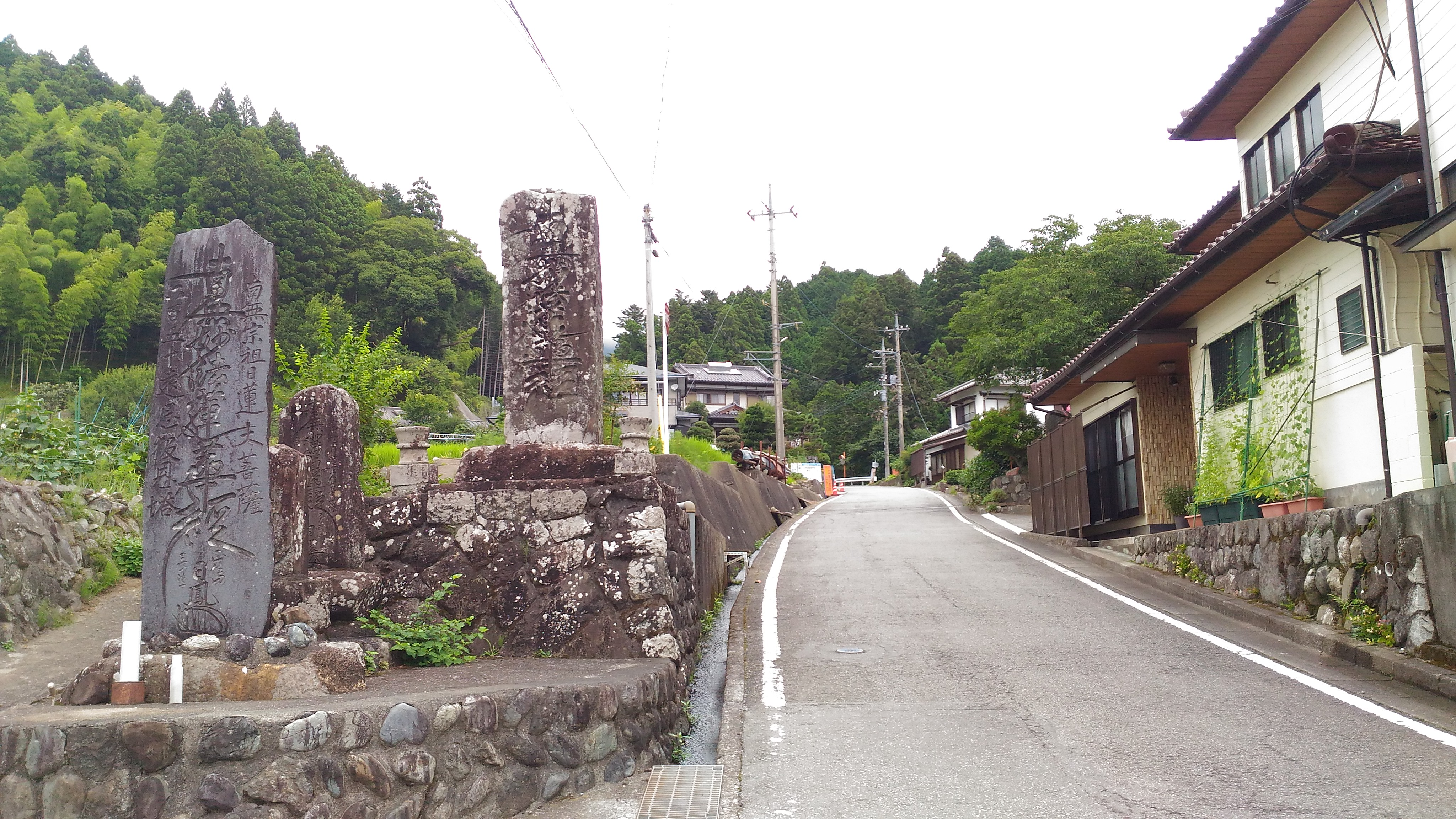 内船寺参道入り口の石碑